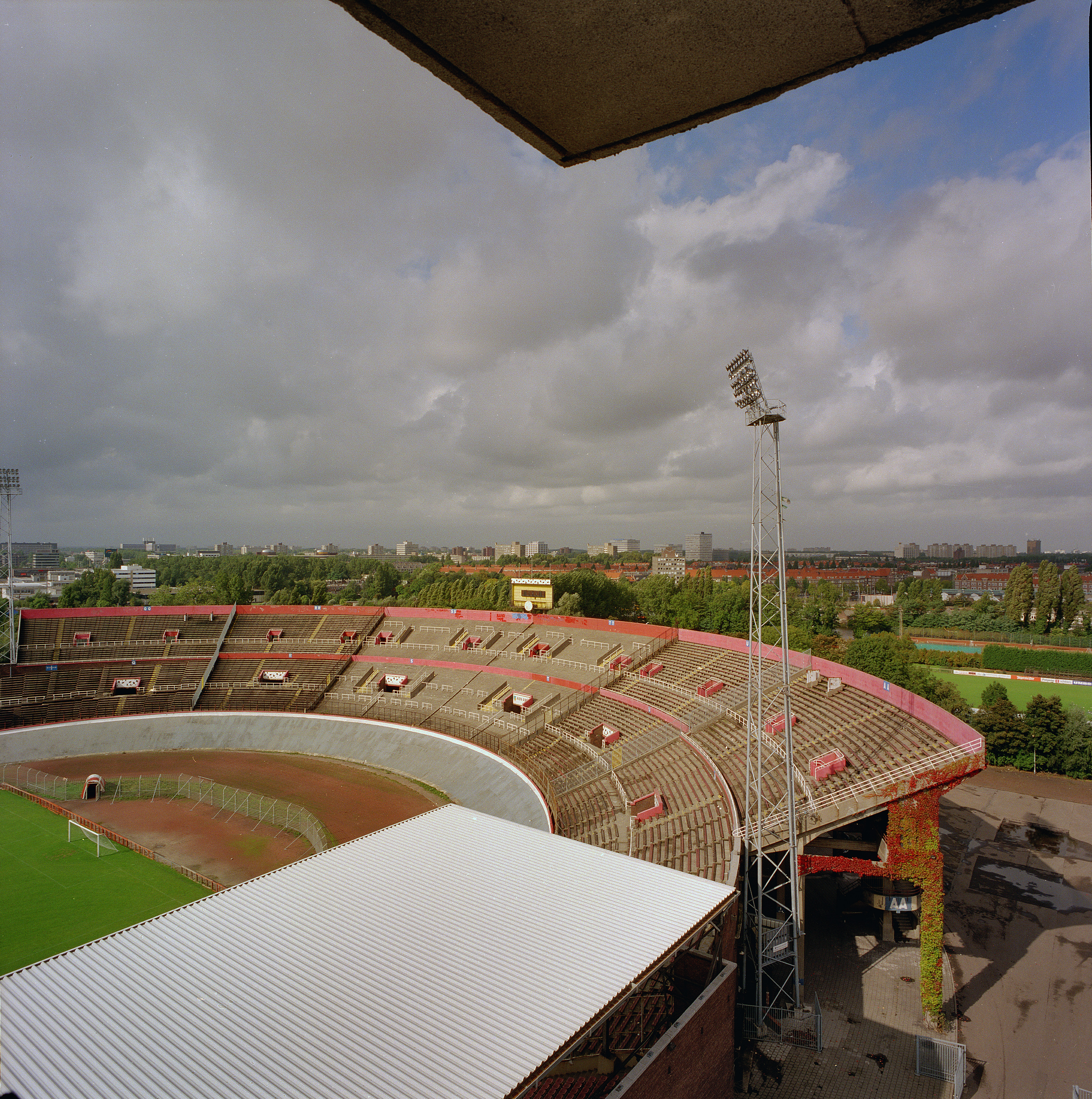 OLYMPISCH STADION: Exterieur OVERZICHT GEDEELTE VAN DE TRIBUNE